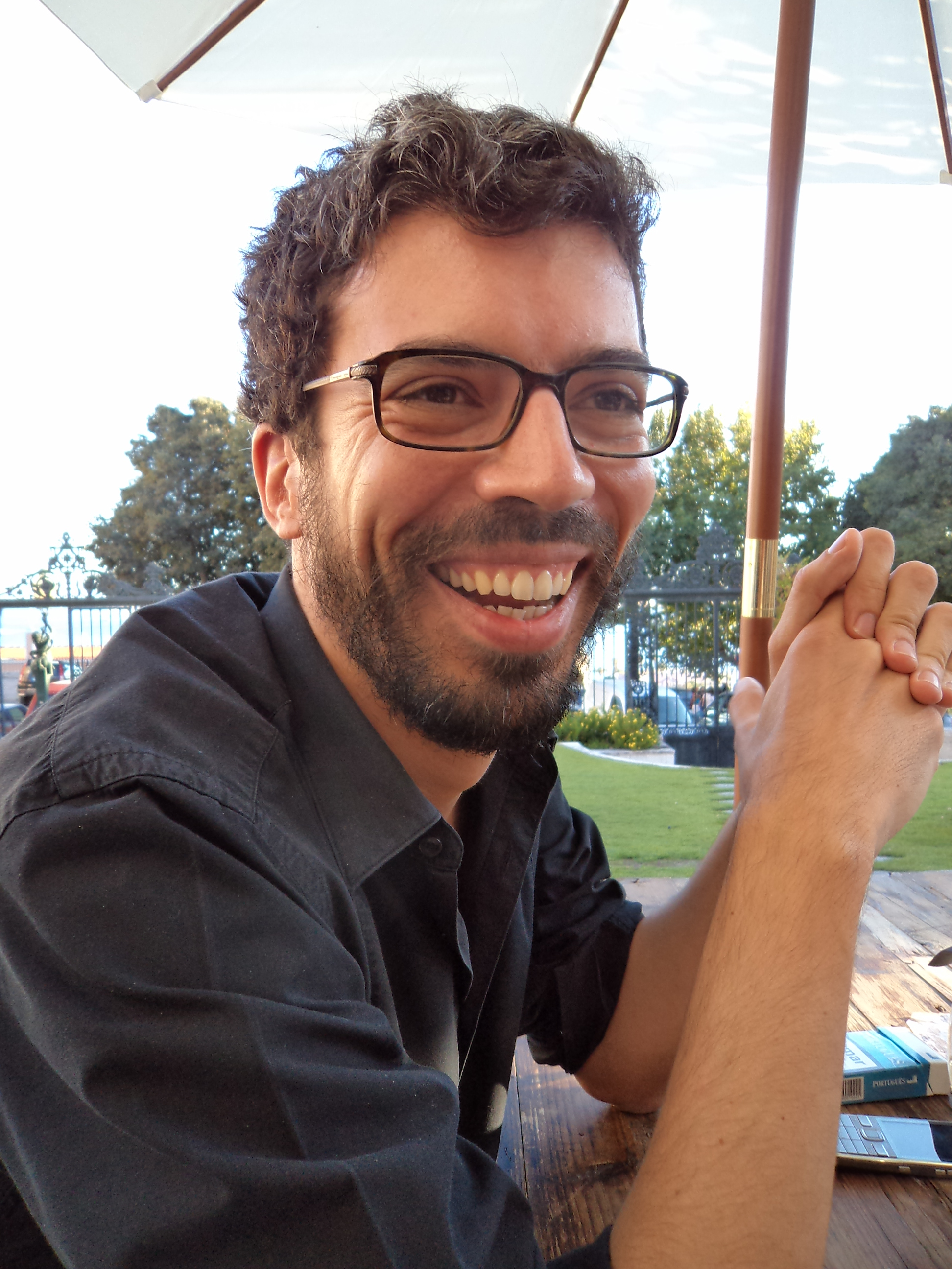 Foto do escritor João Tordo, por Leandro Müller